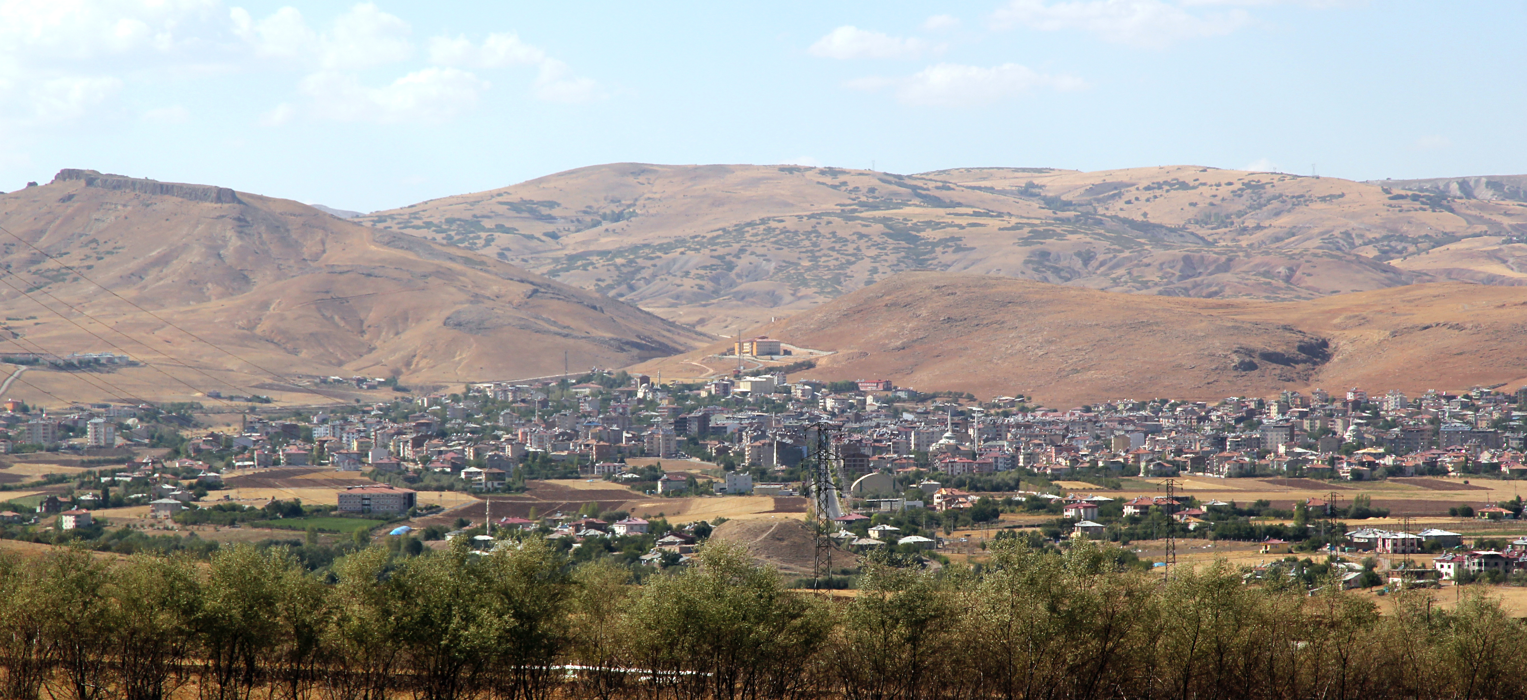 Kovancılar, Stadt in der türkischen Provinz Elazığ, von Südosten